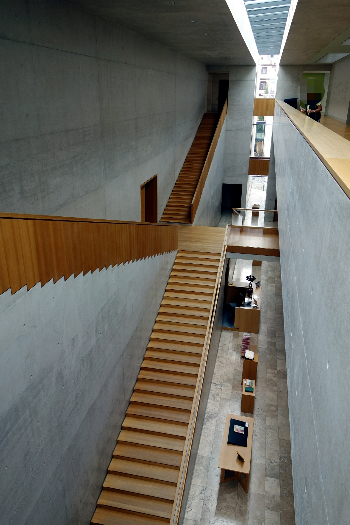 Kunstmuseum Schweinfurt